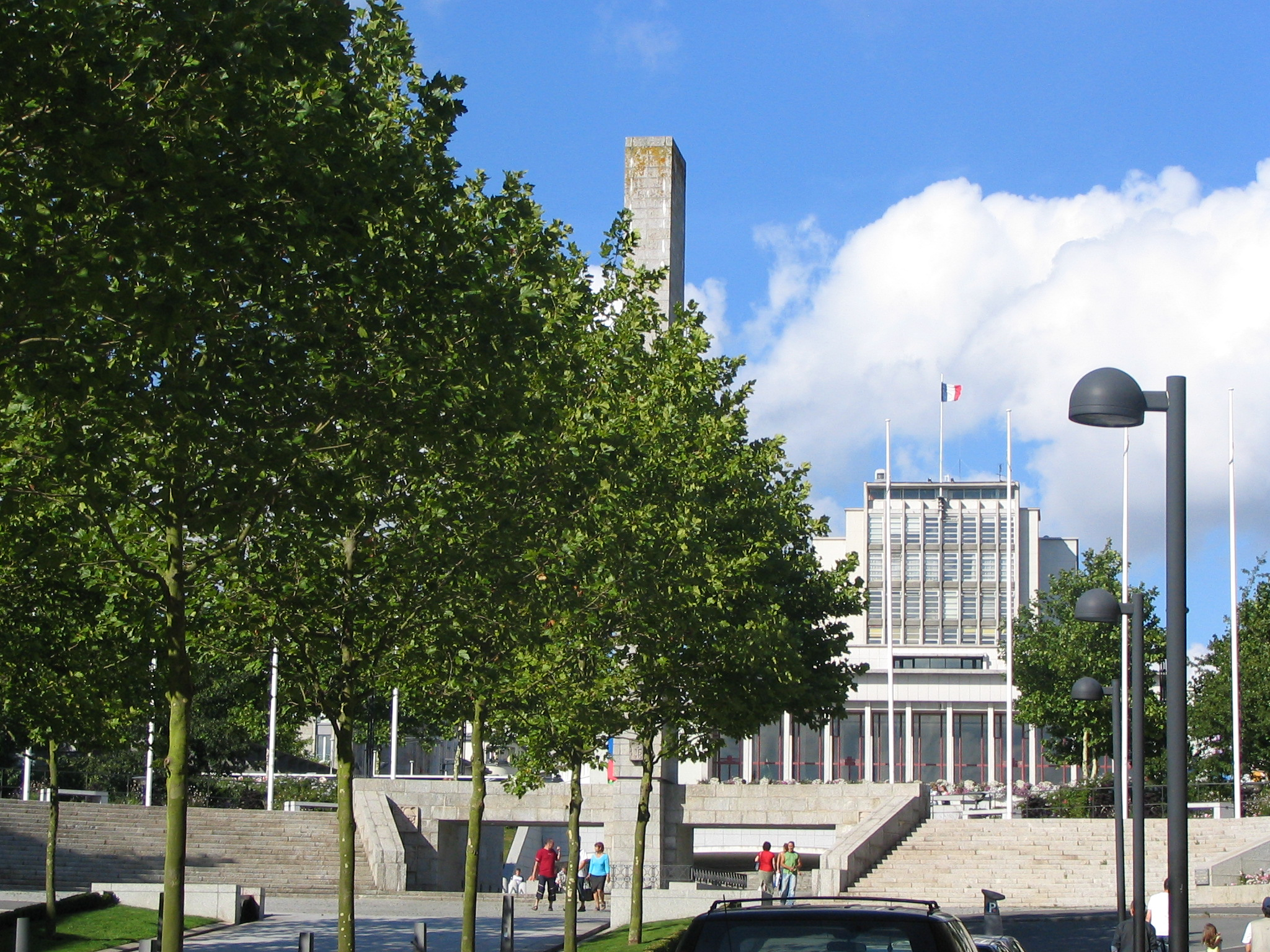 Vue sur l'hôtel de ville depuis la rue de Siam